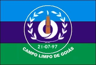 Bandeira de Campo Limpo de Goiás, Brasil